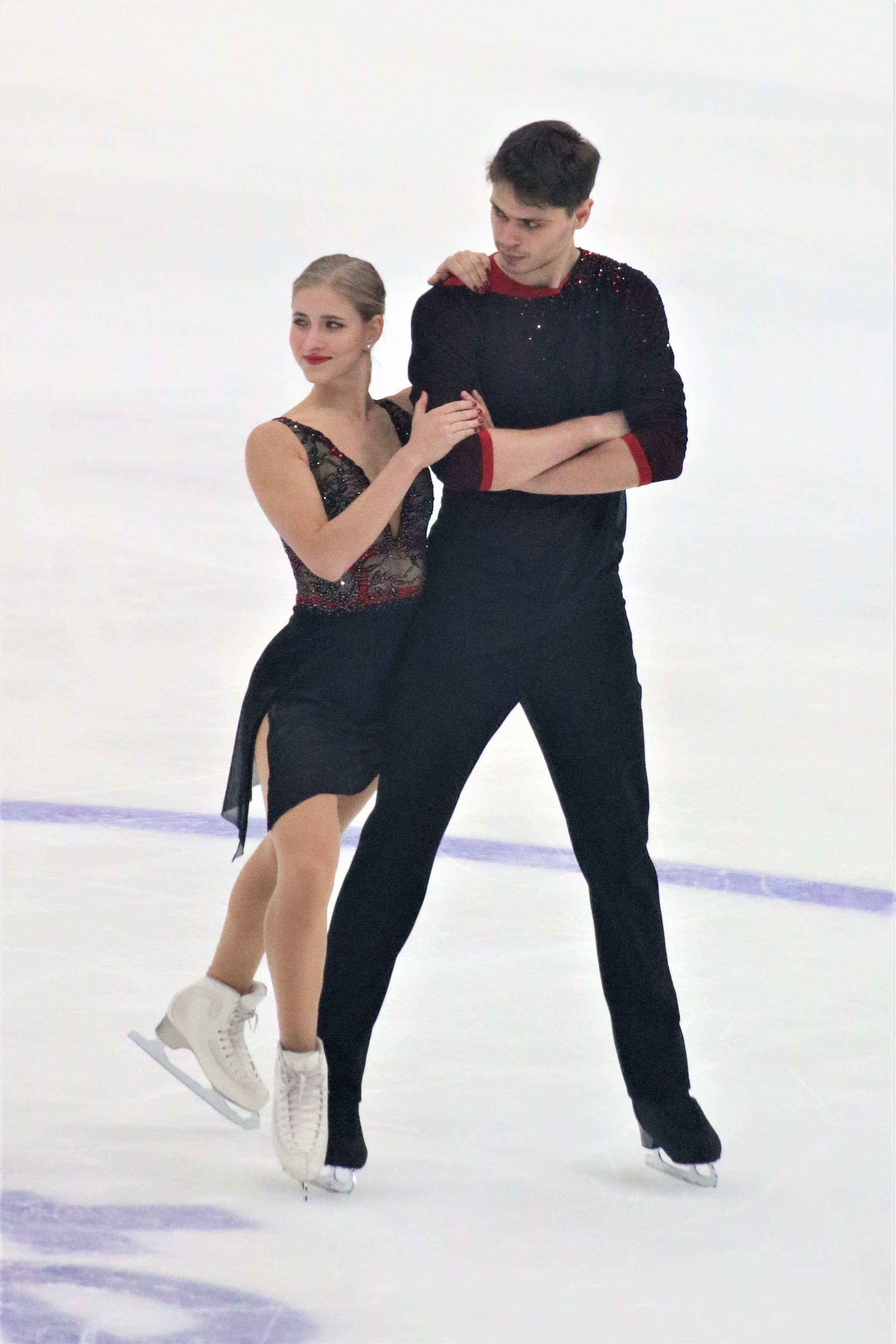 Минерва Фабьенн Хазе / Нолан Зегерт (Германия) на Rostelecom Cup 2019